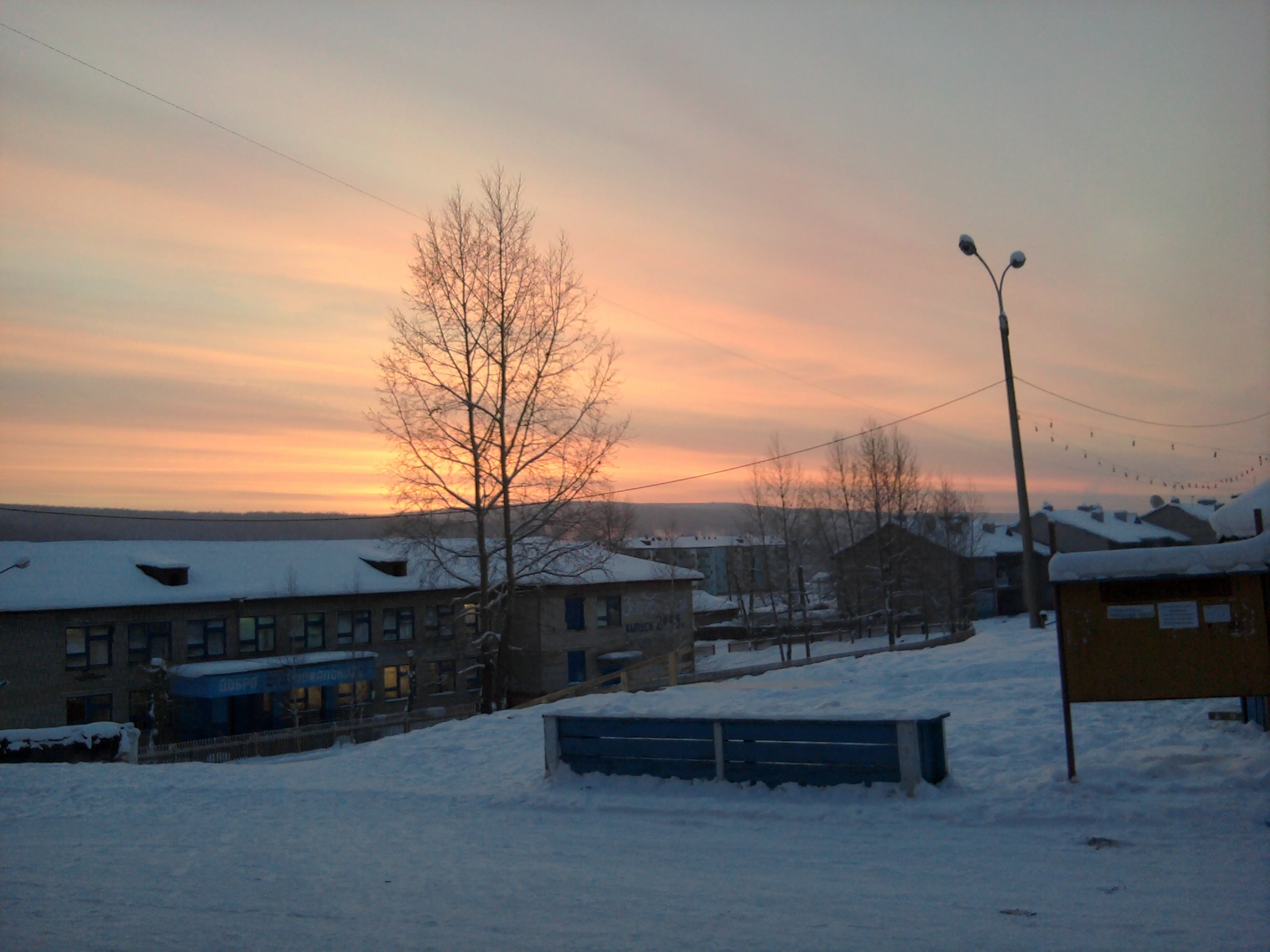 Школа в посёлке Ния (Иркутская область), сфотографированная от здания торгового центра.